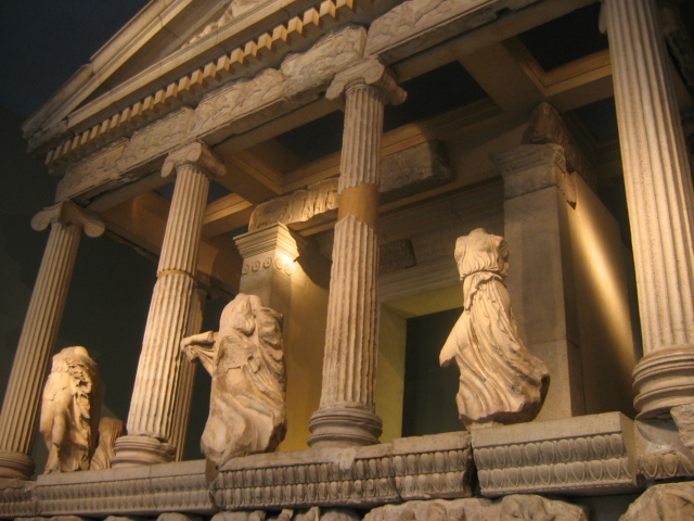 British Museum, London : monument des Néréides, Xanthos, Turquie